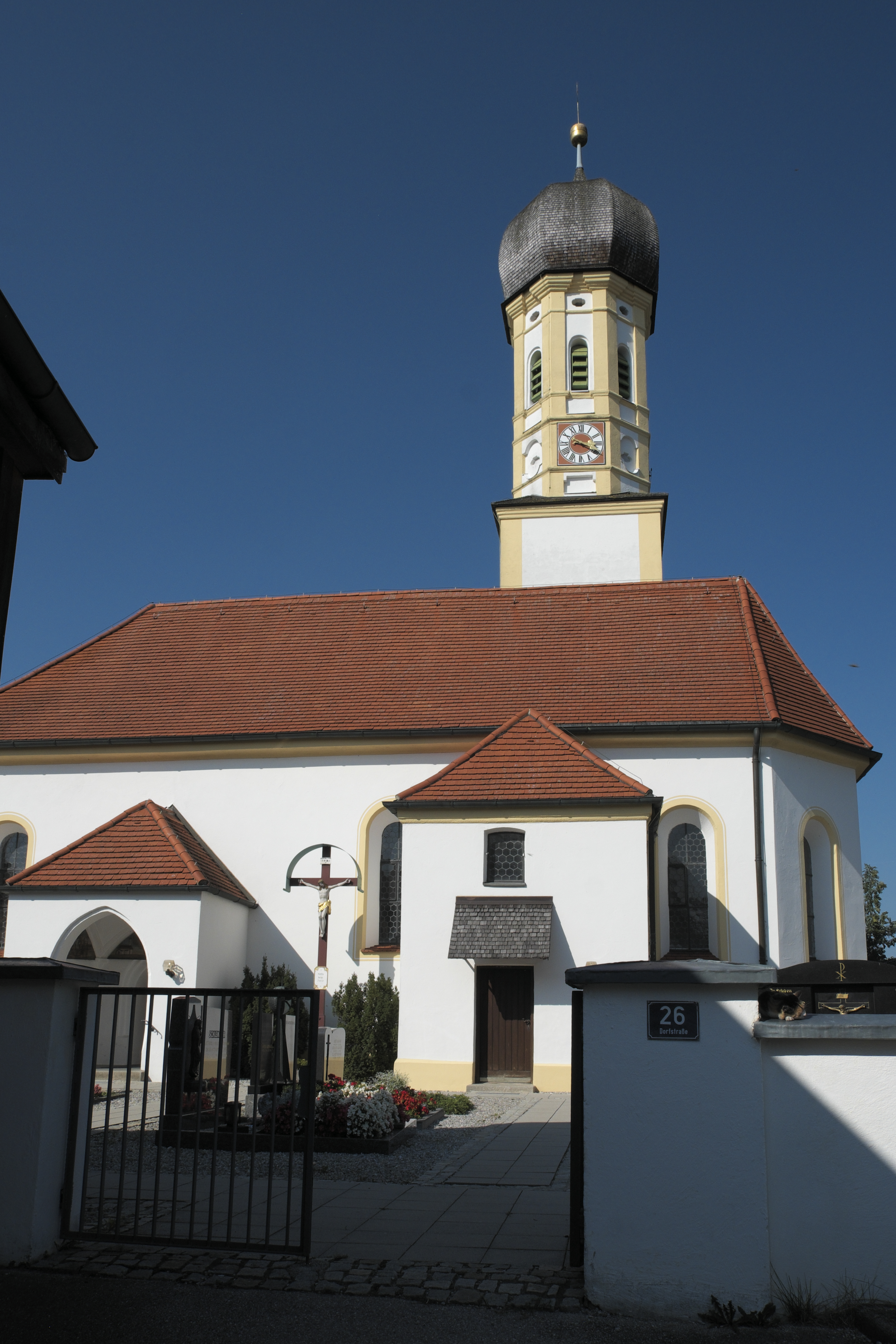 Katholische Filialkirche St. Georg in Pfaffenhofen, einem Ortsteil von Jesenwang im Landkreis Fürstenfeldbruck (Bayern/Deutschland)